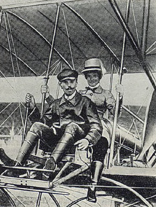 Adolf Warchałowski z księżną Augustą Marią Luizą przed startem